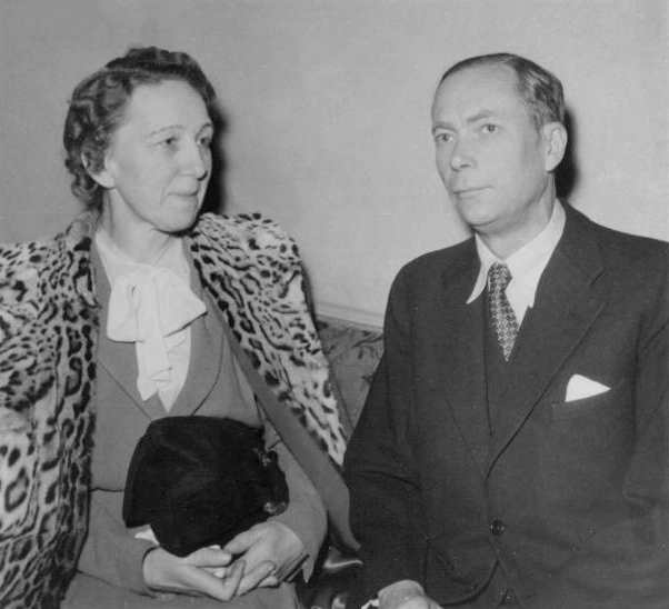 Henrik Dam Professor Nobel Prize winner 1944, with his wife